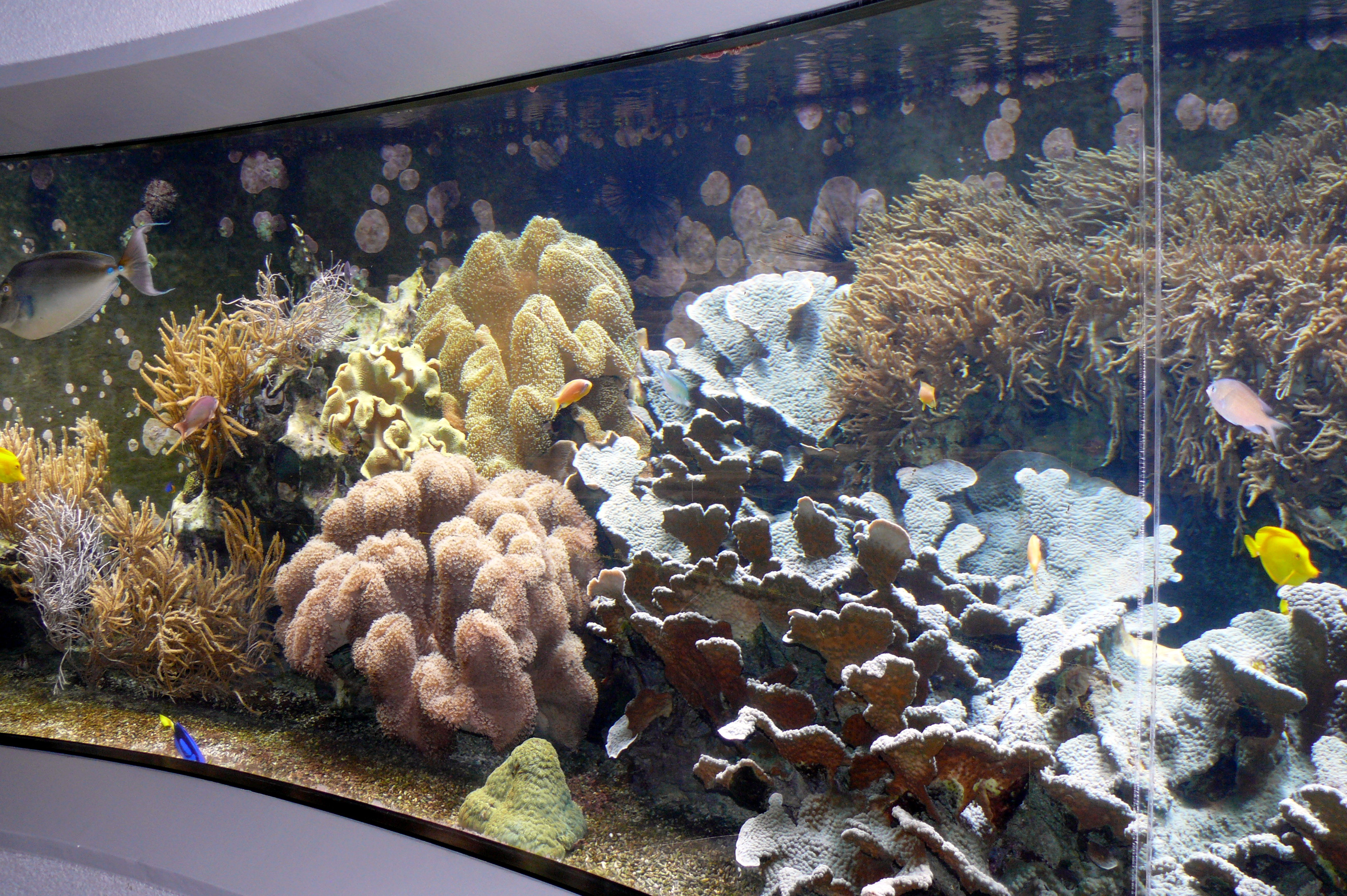 Riffaquarium